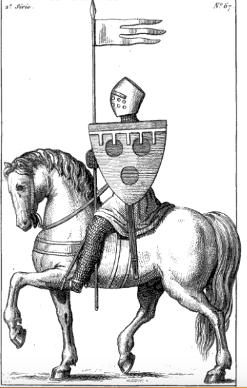 Peter of Courtenay (1250)